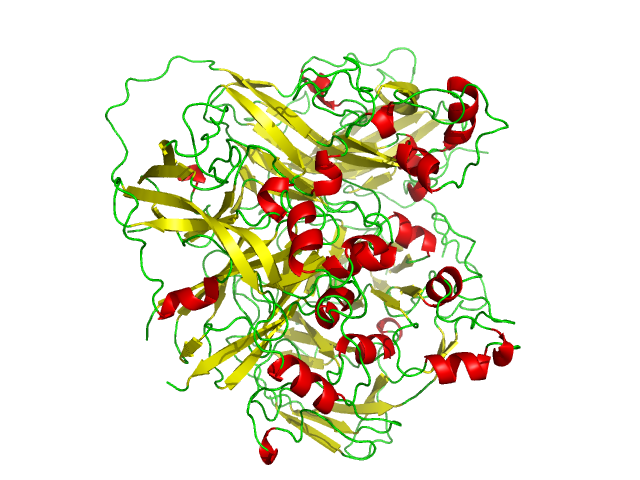 Ceruloplasmin (PDB:1KCW)